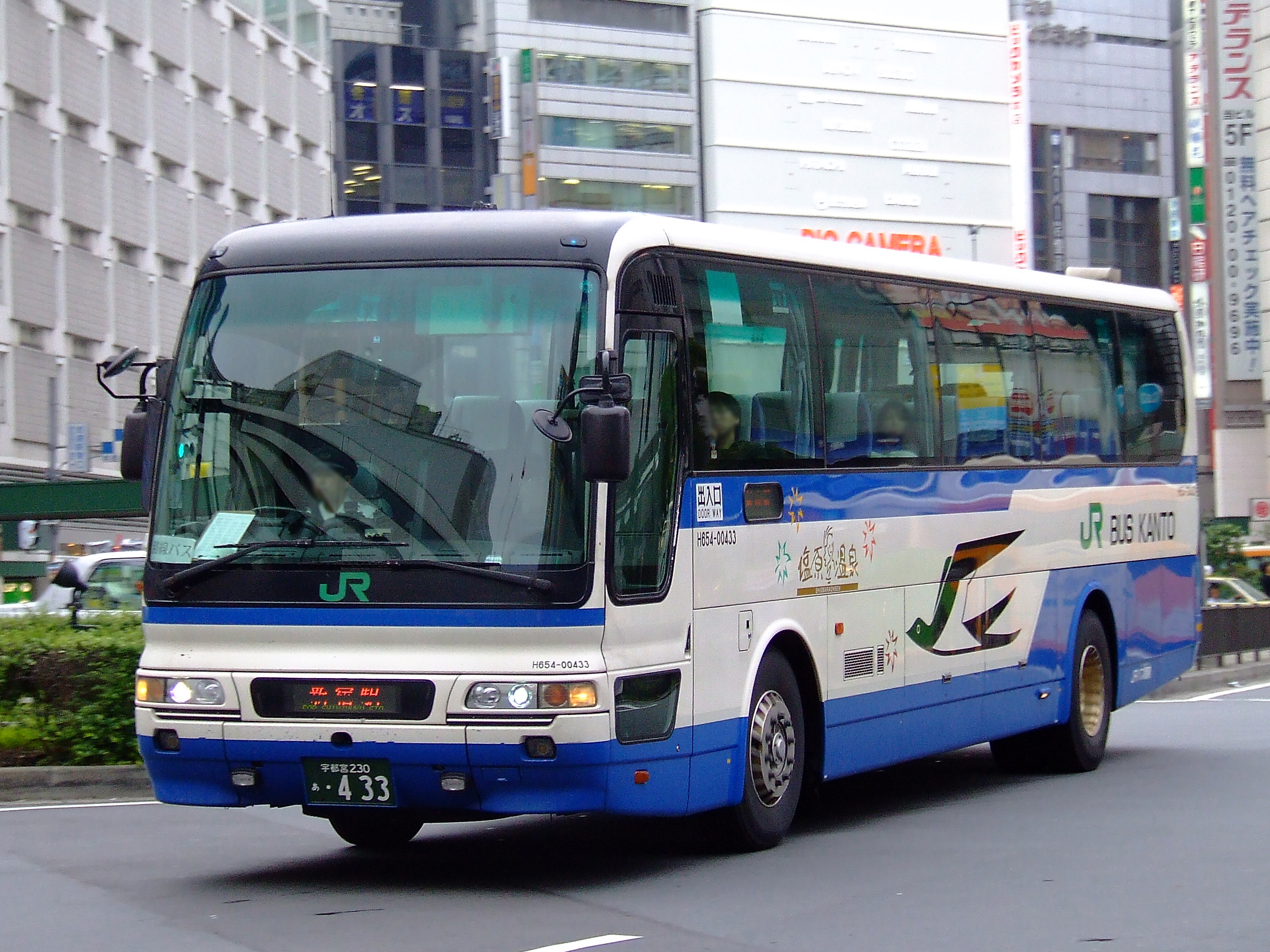 JRバス関東の高速バス「もみじ号」池袋駅付近にて